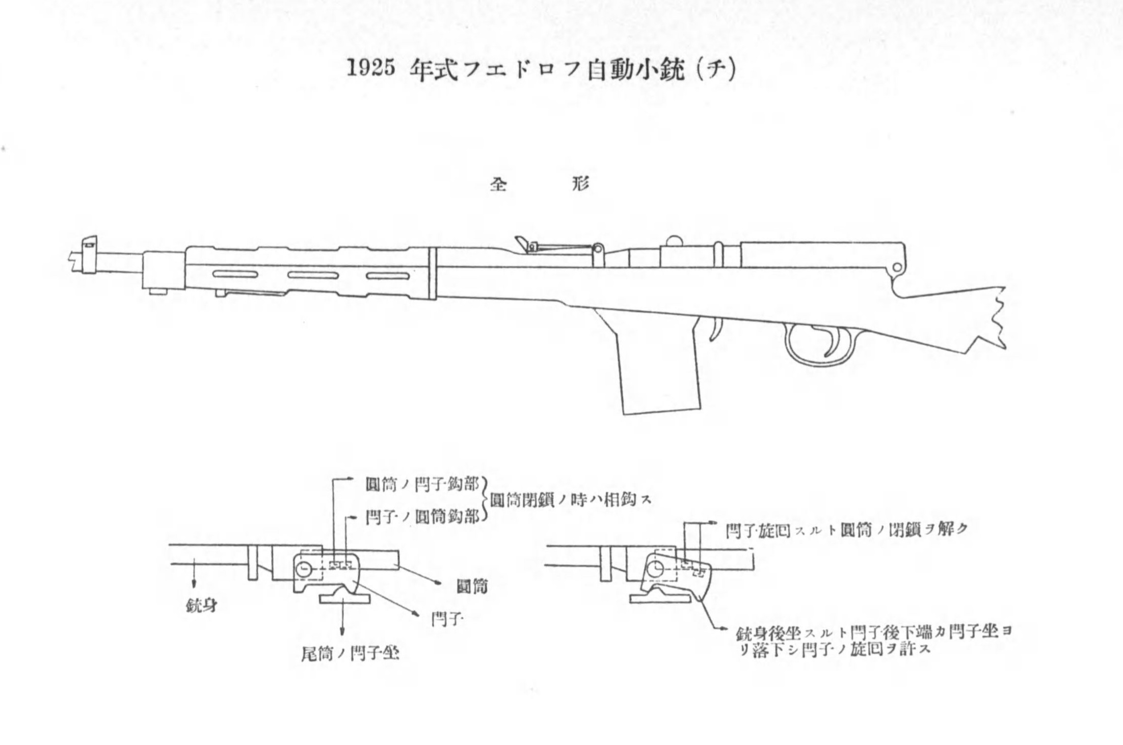 フェドロフ自動小銃の構造図。